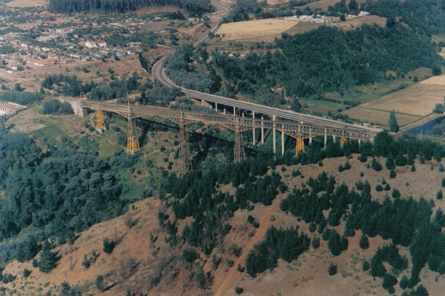 Viaducto del Río Malleco